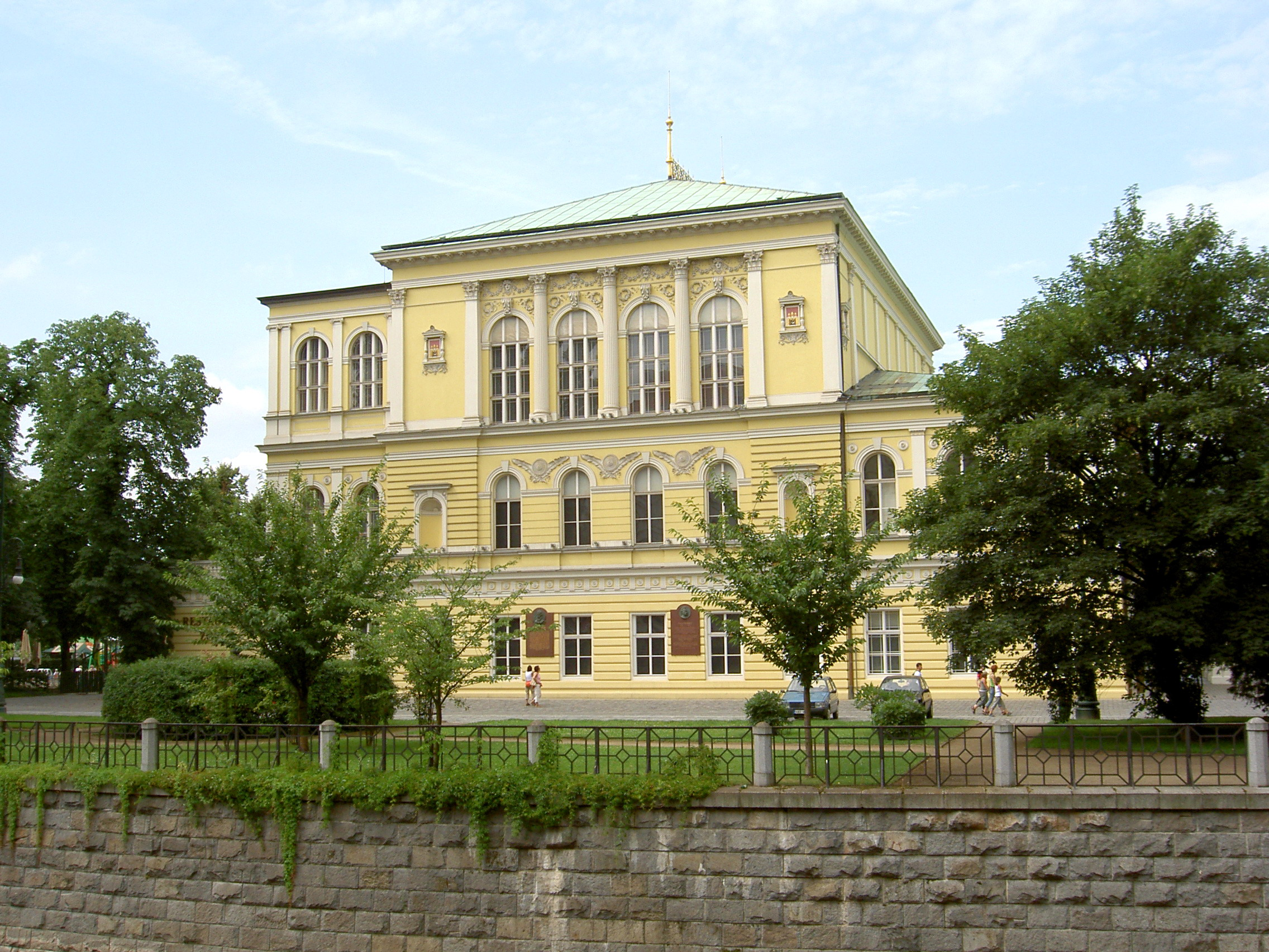 Žofín